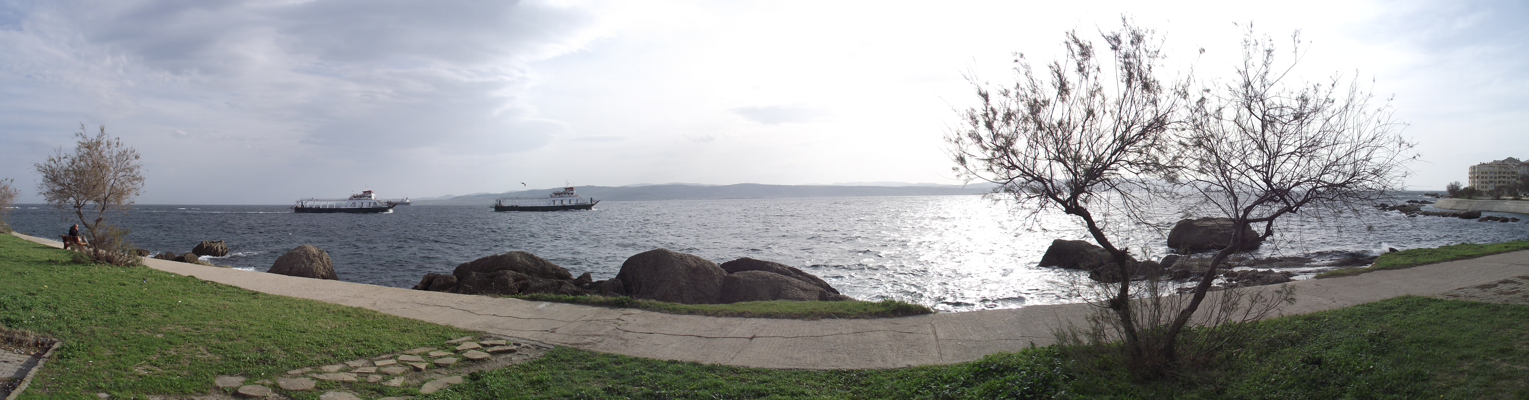 gelibolu gemiler